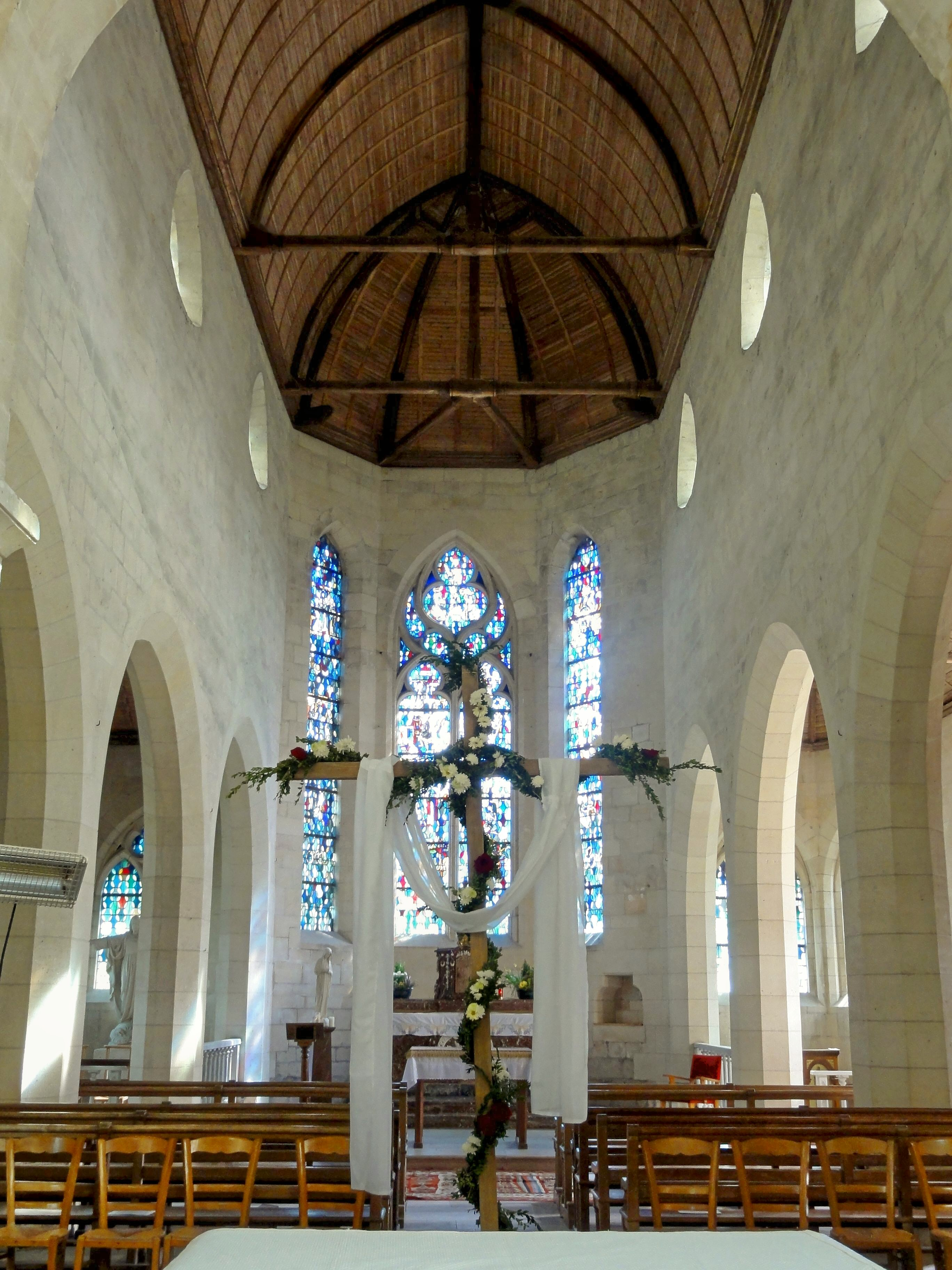 Chœur.